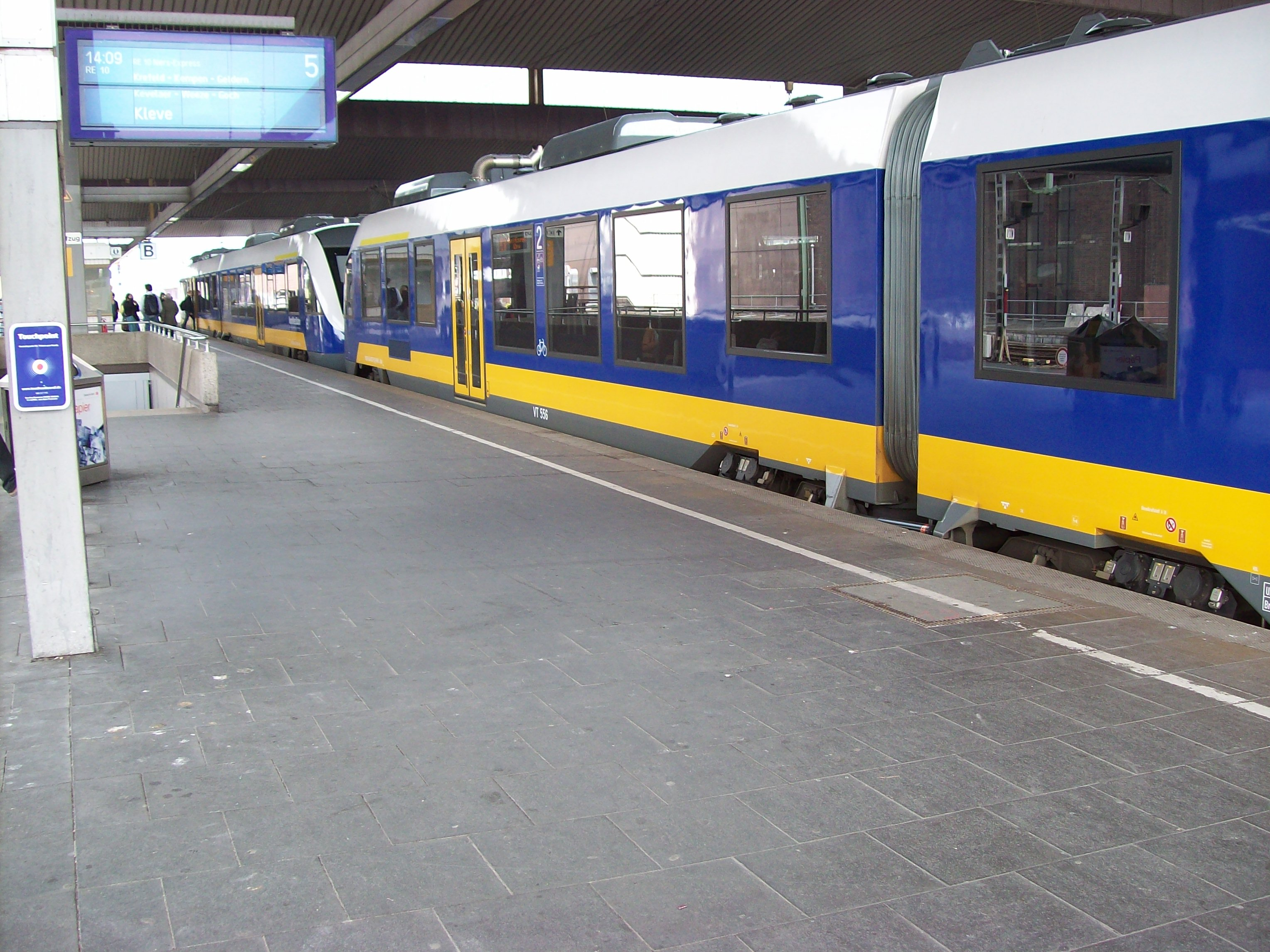 RE 10 der Nordwestbahn in Düsseldorf Hbf